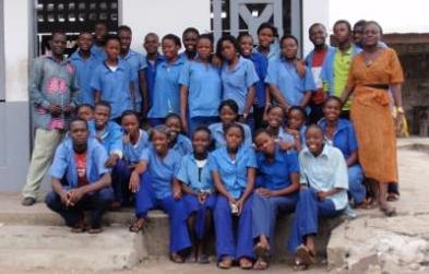 Classe de T3A (équivalent du CM1) à l'École Spéciale de Brazzaville (Congo)